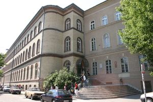 Leövey Klára Gimnázium, Budapest